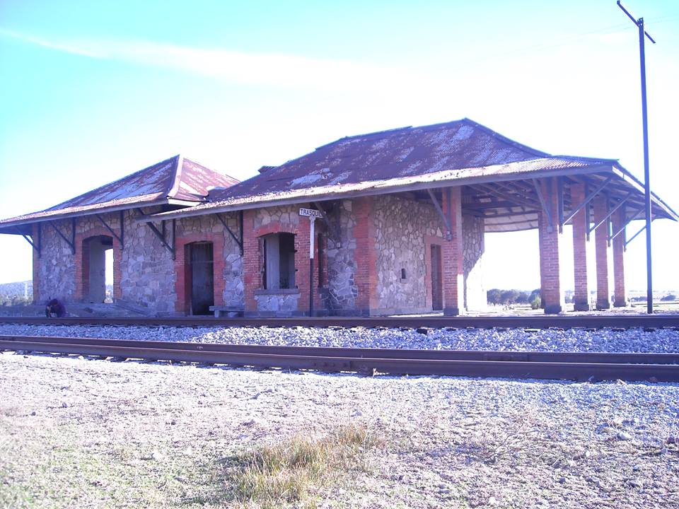 La Trasquila, antigua estación de tren